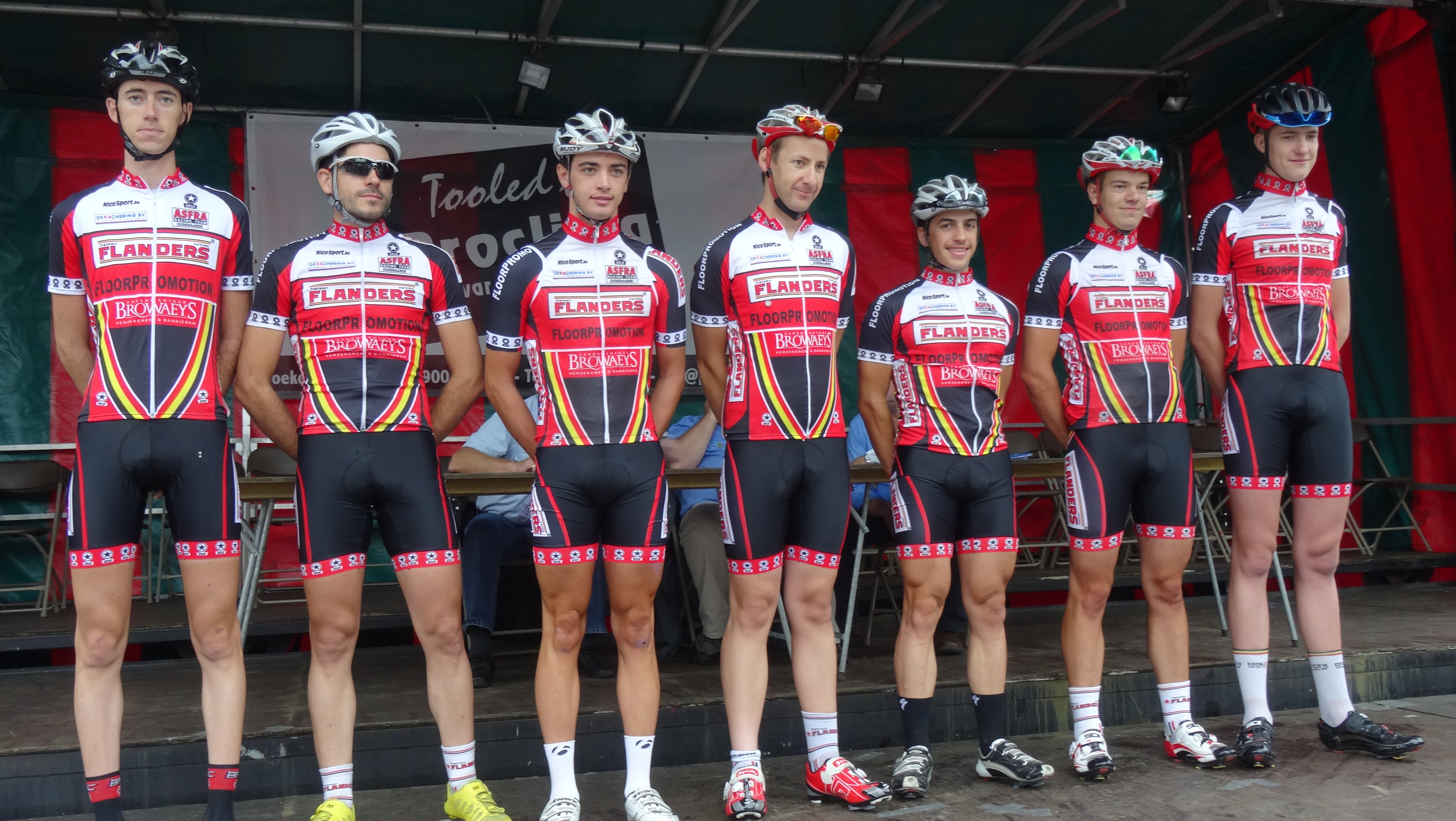 Reportage photographique réalisé le dimanche 10 août à l'occasion du départ et de l'arrivée de la Flèche du port d'Anvers 2014 à Merksem (Anvers), Belgique.